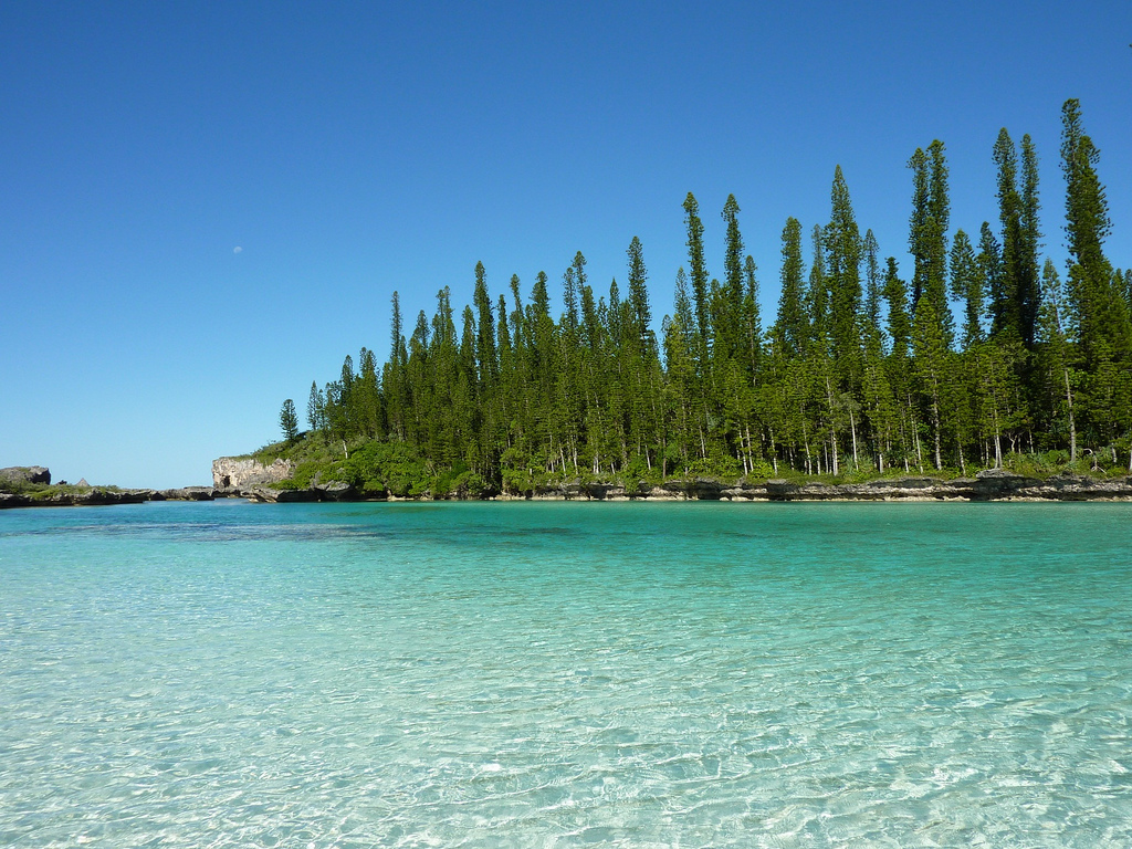 Araucaria columnaris, native, L'Île-des-Pins, New Caledonia.